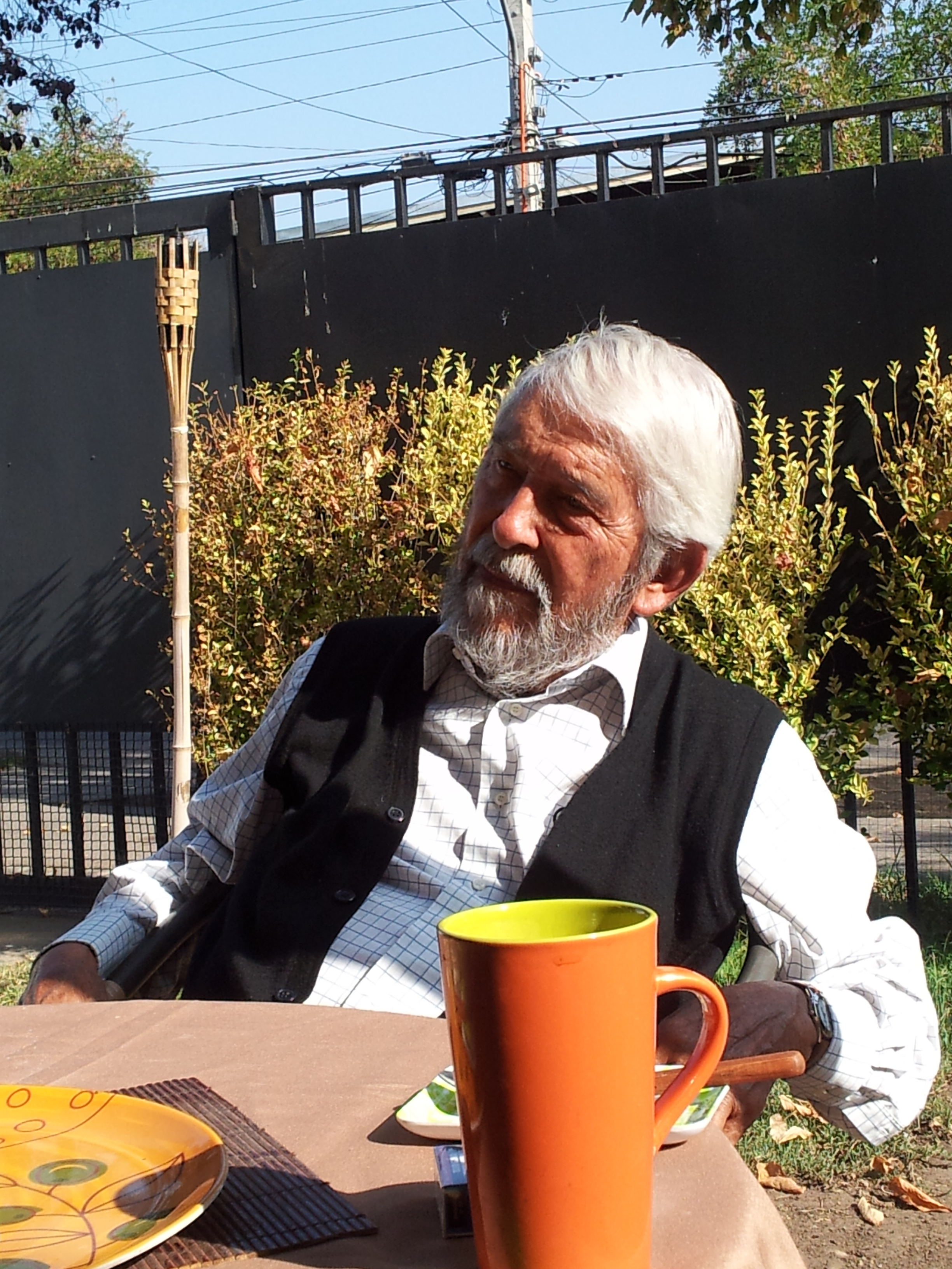 Foto del Periodista Alberto "Gato" Gamboa